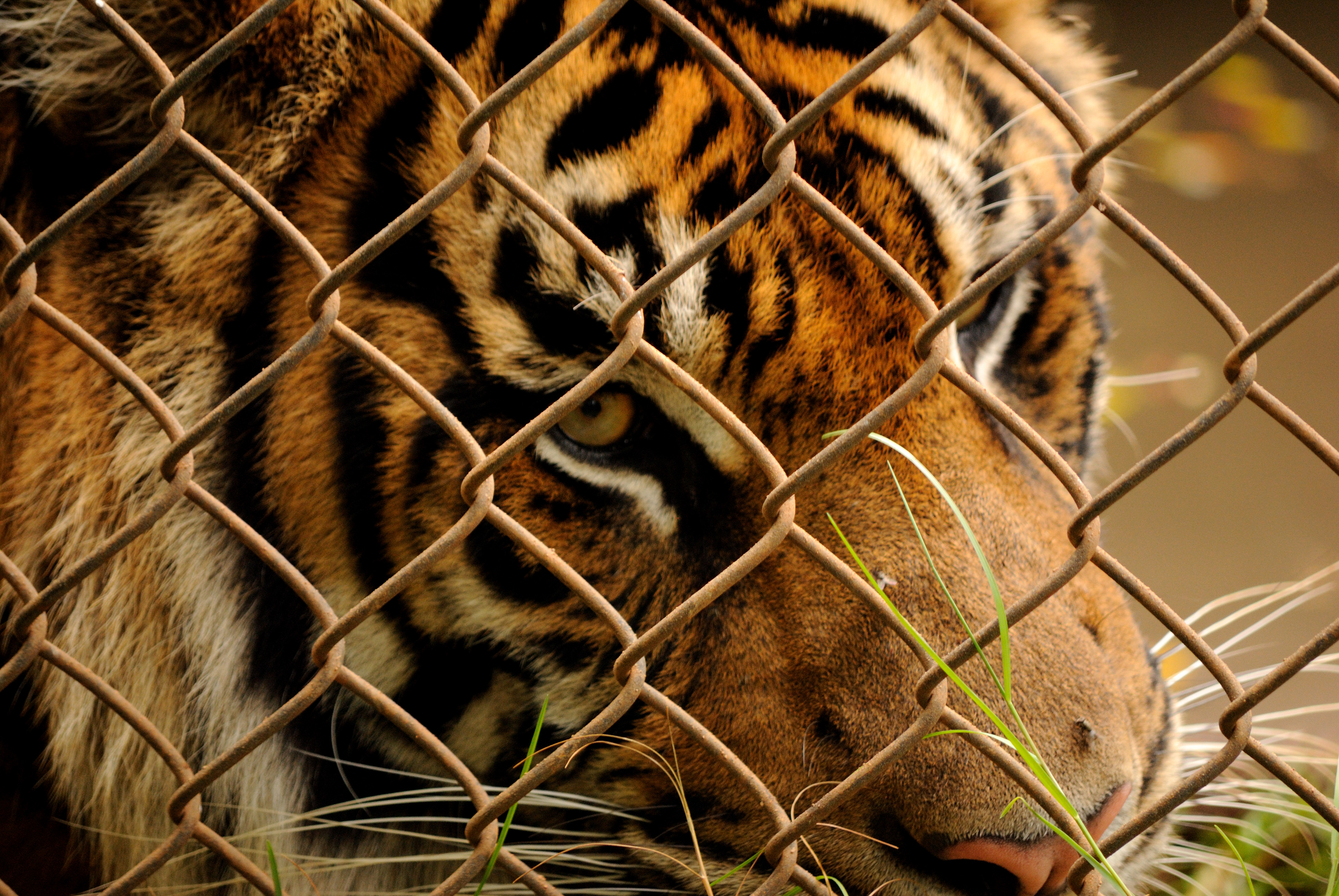 Tiger behind chainlink fence